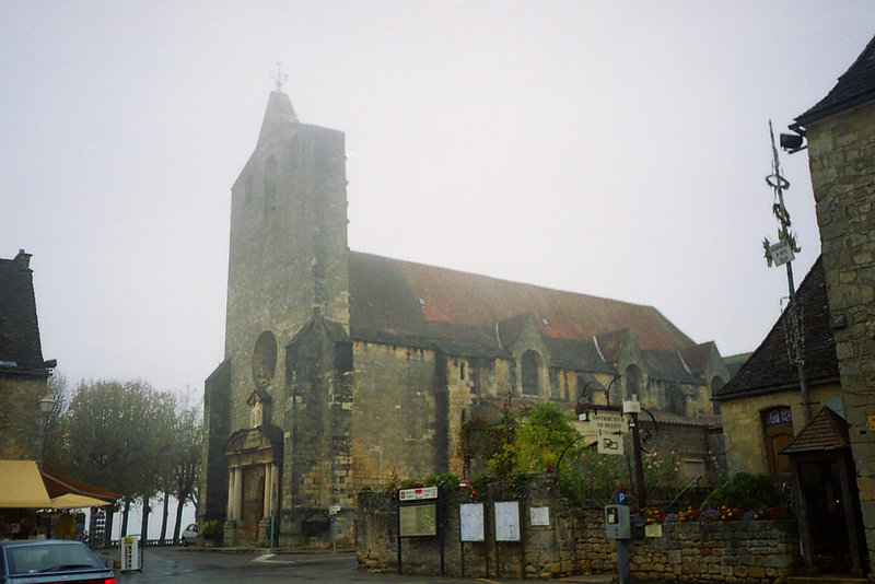 Kościół w Domme